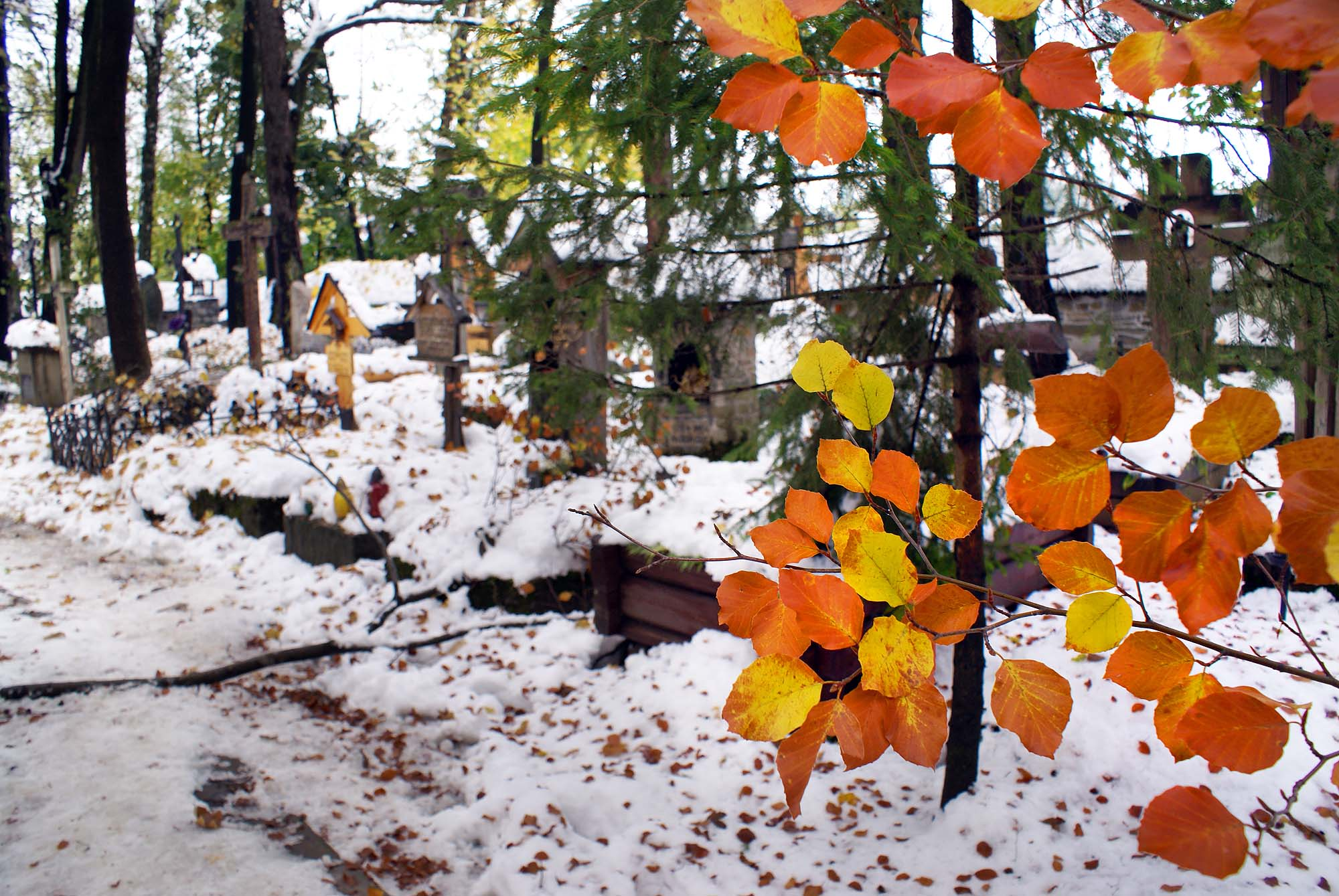 Zakopane, cmentarz "Na Pęksowym Brzyzku"